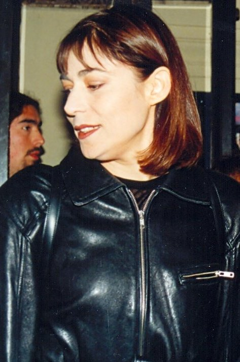 Actrices Esperanza Silva y Francisca García-Hudobro; Invitadas especiales; año 2000